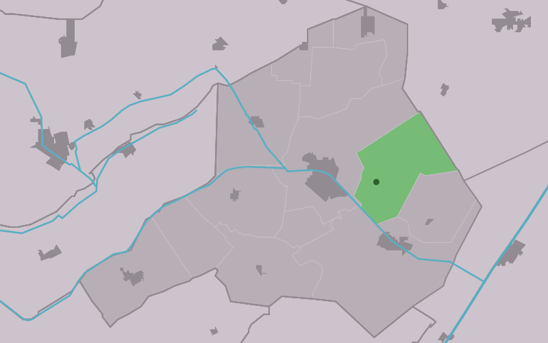 Kaartsje fan himrik fan De Fochtel